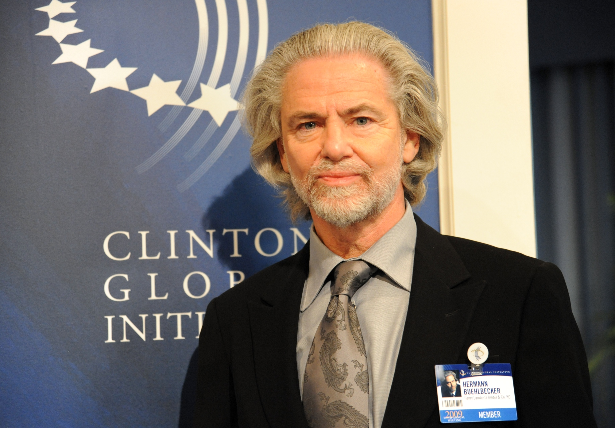 Lambertz-Inhaber Dr. Hermann Bühlbecker, auf dem Fifth Annual Meeting der Clinton Global Initiative, 2009 in New York